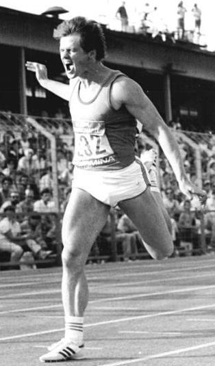 Thomas Schröder, Steffen Bringmann ADN-ZB Kluge 27.6.86 Bez. Gera: 37. DDR-Meisterschaften der Leichtathleten in Jena - Thomas Schröder (SC Neubrandenburg) wurde auf dem Jenaer Ernst-Abbe-Sportfeld in 10,10 s Meister im 100-m-Lauf).